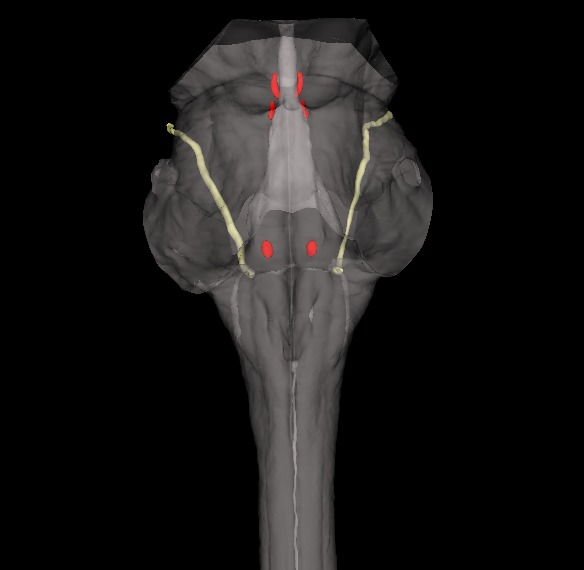 Argazki honetan nukleo okulomotorea, nukleoa troklearra eta abducens nukleoa agertzen dira. Abducens nerbioa ere ikusi daiteke.